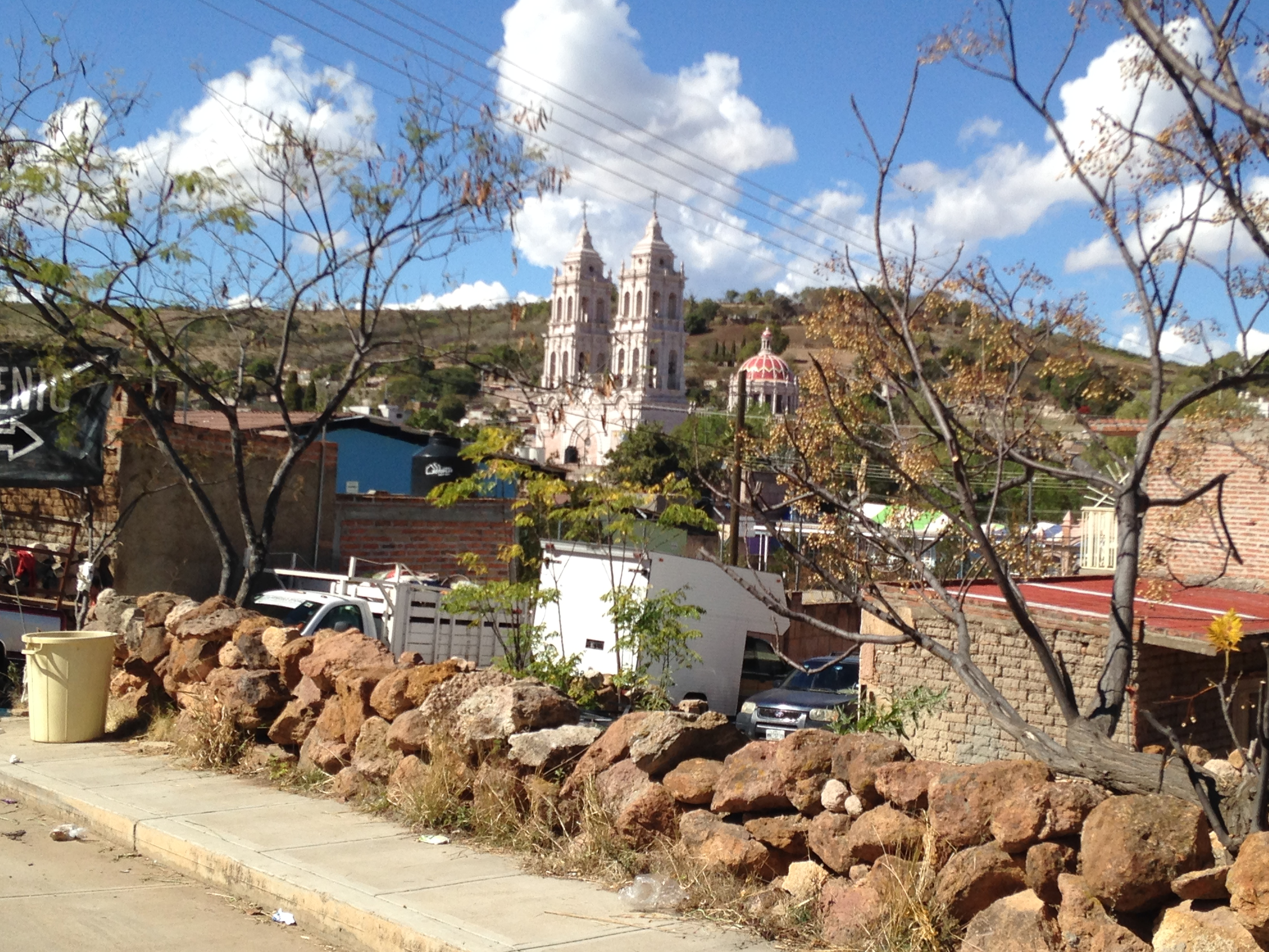 Santuario de Temastían a lo lejos